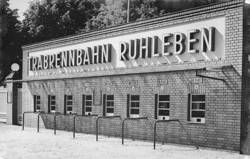 Berlin, 1939 Die Umgestaltung der Trabrennbahn Ruhleben